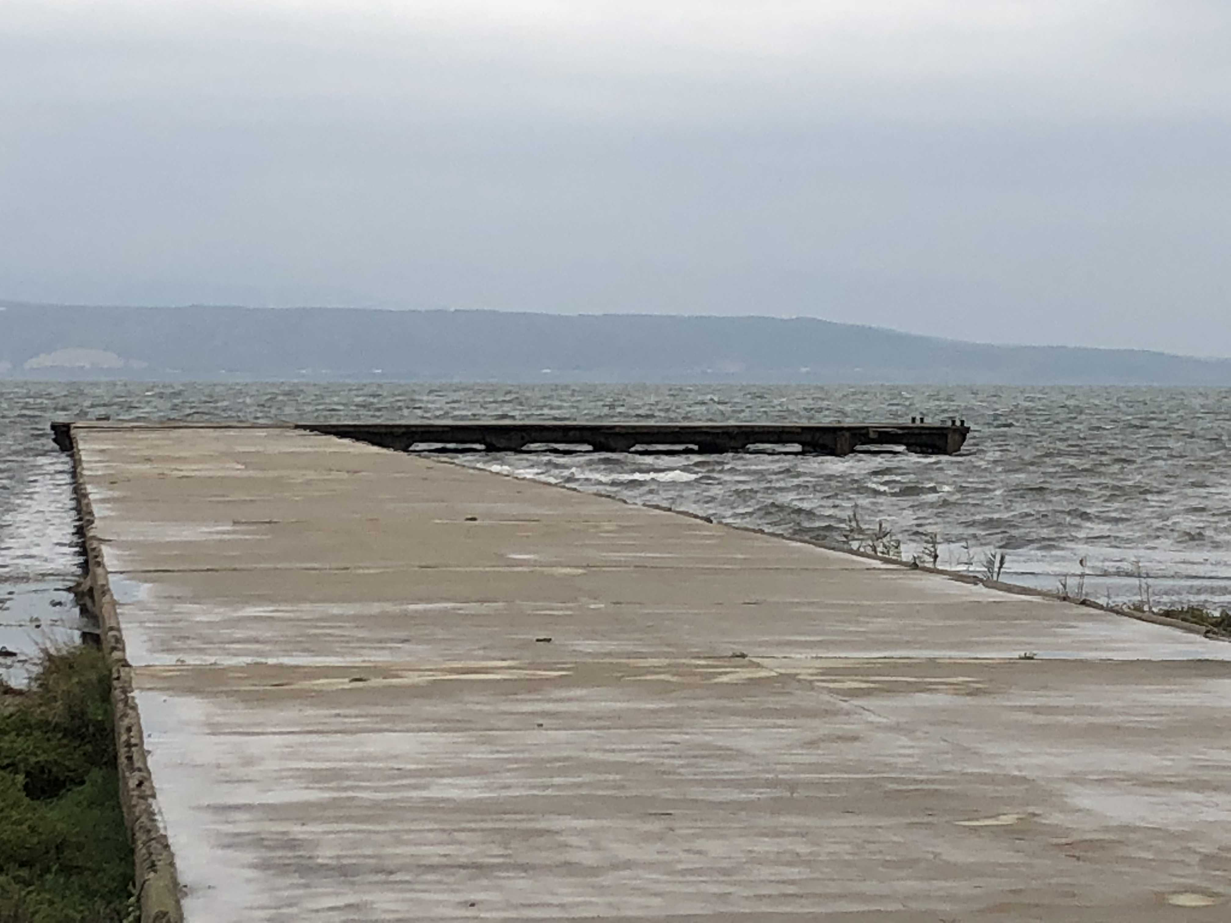 Moll de la base aeronaval Latécoère (1925-1936) a la vora sud de l'estany de Salses, terme municipal de Sant Llorenç de la Salanca